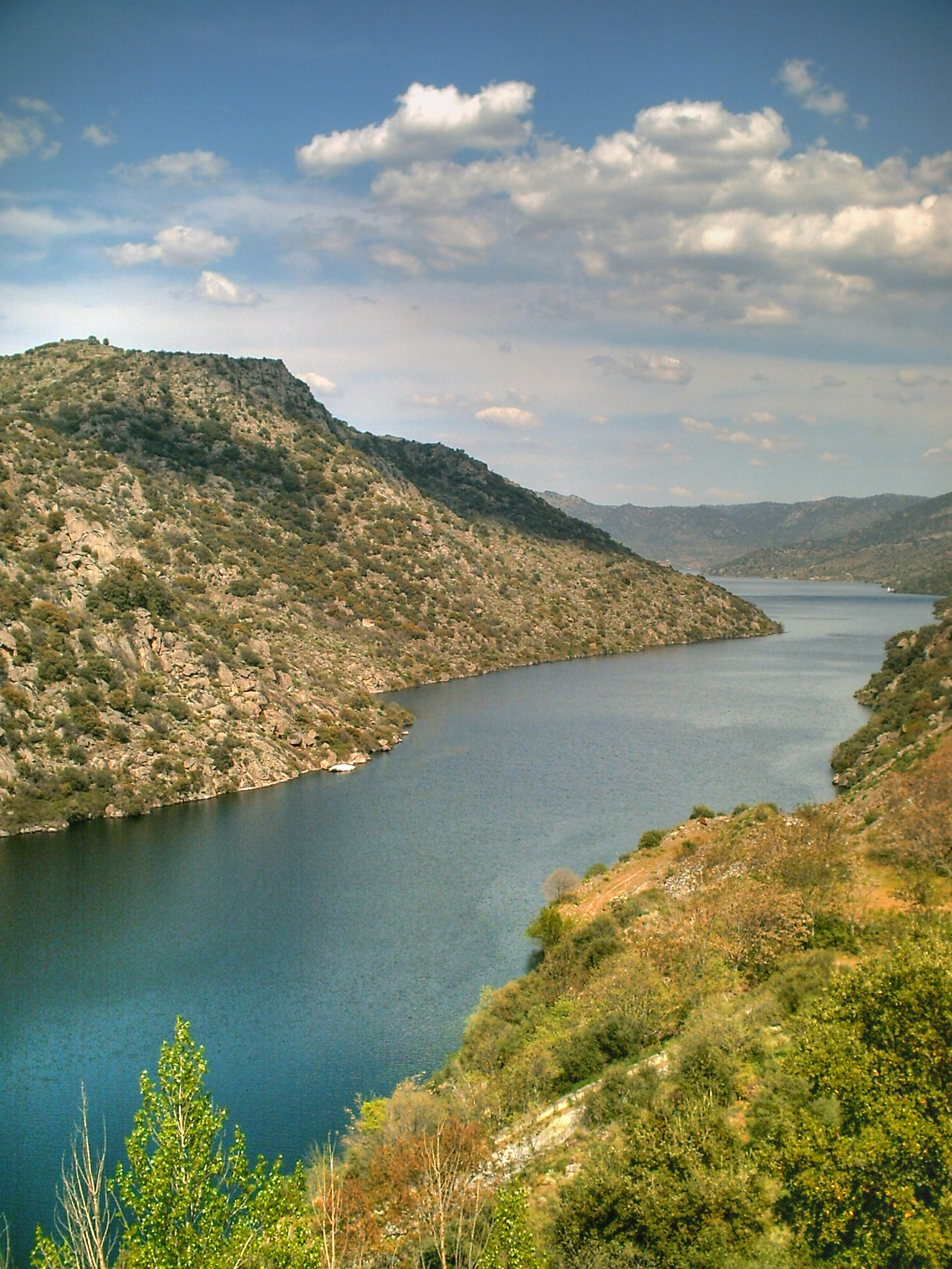 Vista del río Duero desde Saucelle (provincia de Salamanca, España) en los Arribes del Duero.Arribes del Duero